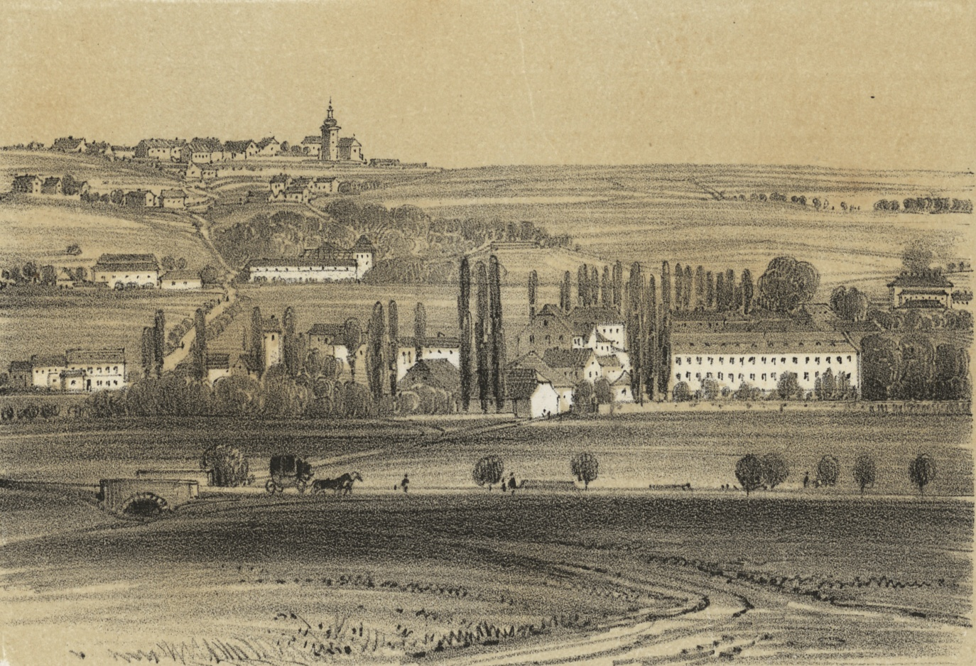 Wisoczan